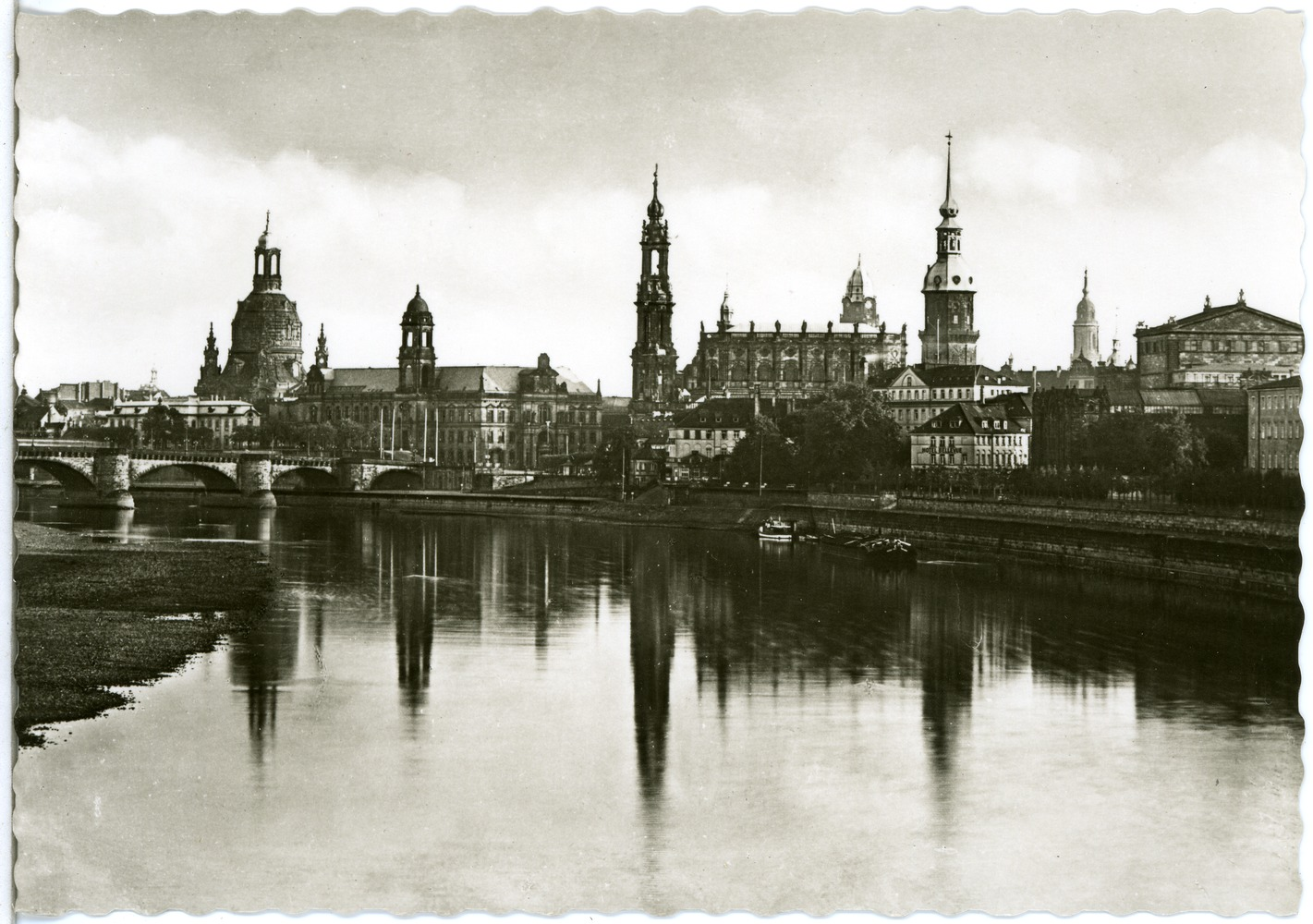 Dresden; Blick auf Dresden This postcard is from publisher Brück & Sohn in Meißen ( postcard has a unique number 29586 and is available in a higher resolution at the publisher. This images was uploaded in a cooperation project between Wikipedians and the publisher.